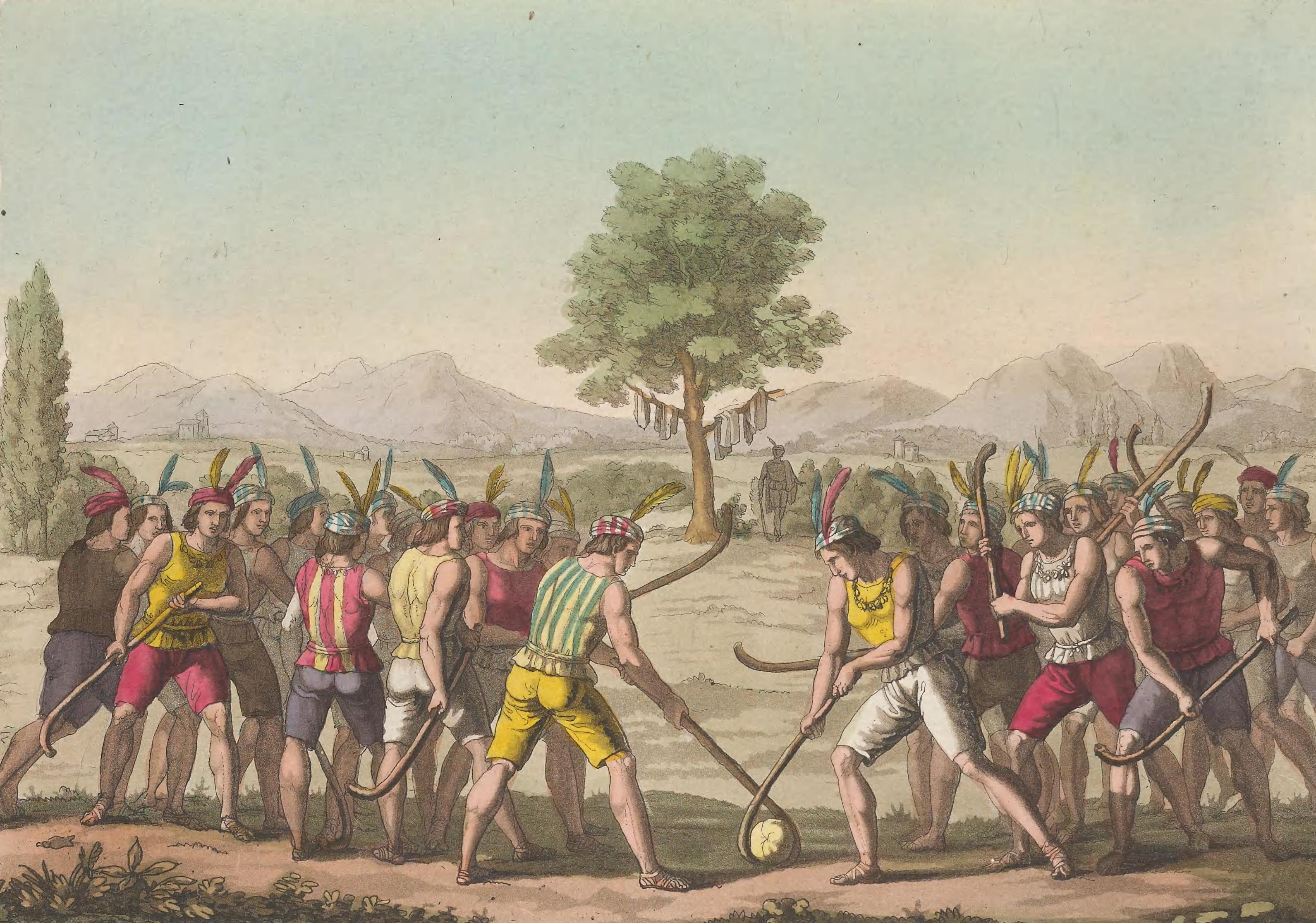 Le jeu de la Ciueca.